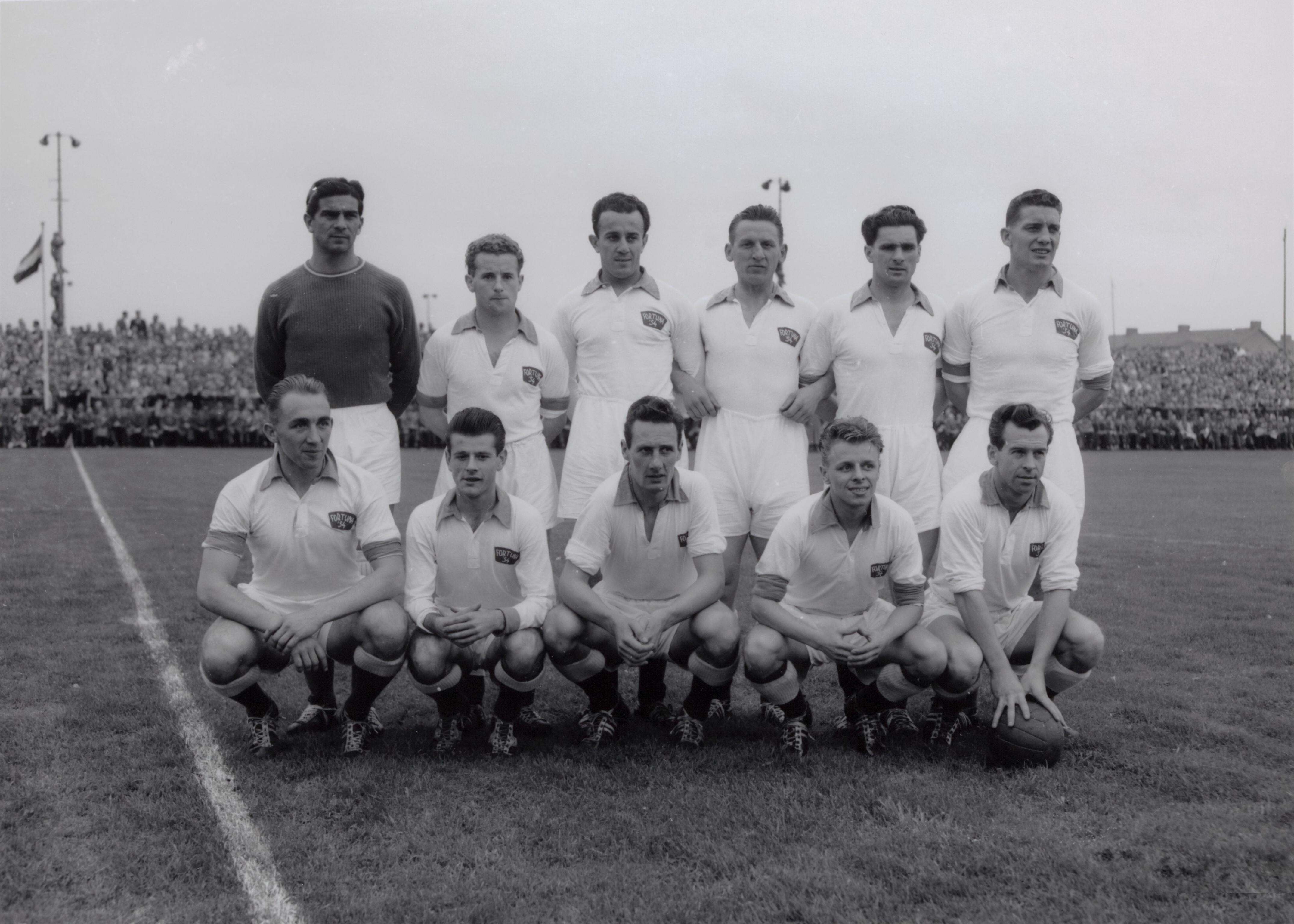 Collectie / Archief : Fotocollectiie Afdrukken ANEFO Rousel Reportage / Serie : Serie Afdrukken ANEFO [RVD Eigen zonder caption] Beschrijving : Collectie Fotocollectiie Afdrukken ANEFO Rousel, fotonummer 157-0935 Annotatie : Zie 90 Datum : 1956 Fotograaf : Afdruk zonder naam fotograaf / Anefo Auteursrechthebbende : Nationaal Archief Materiaalsoort : Foto (zwart/wit) Nummer archiefinventaris : bekijk toegang 2.24.10.02 Bestanddeelnummer : 157-0935